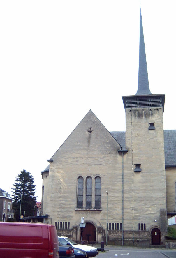 Kerk in Broekhem, gemeente Valkenburg aan de Geul.